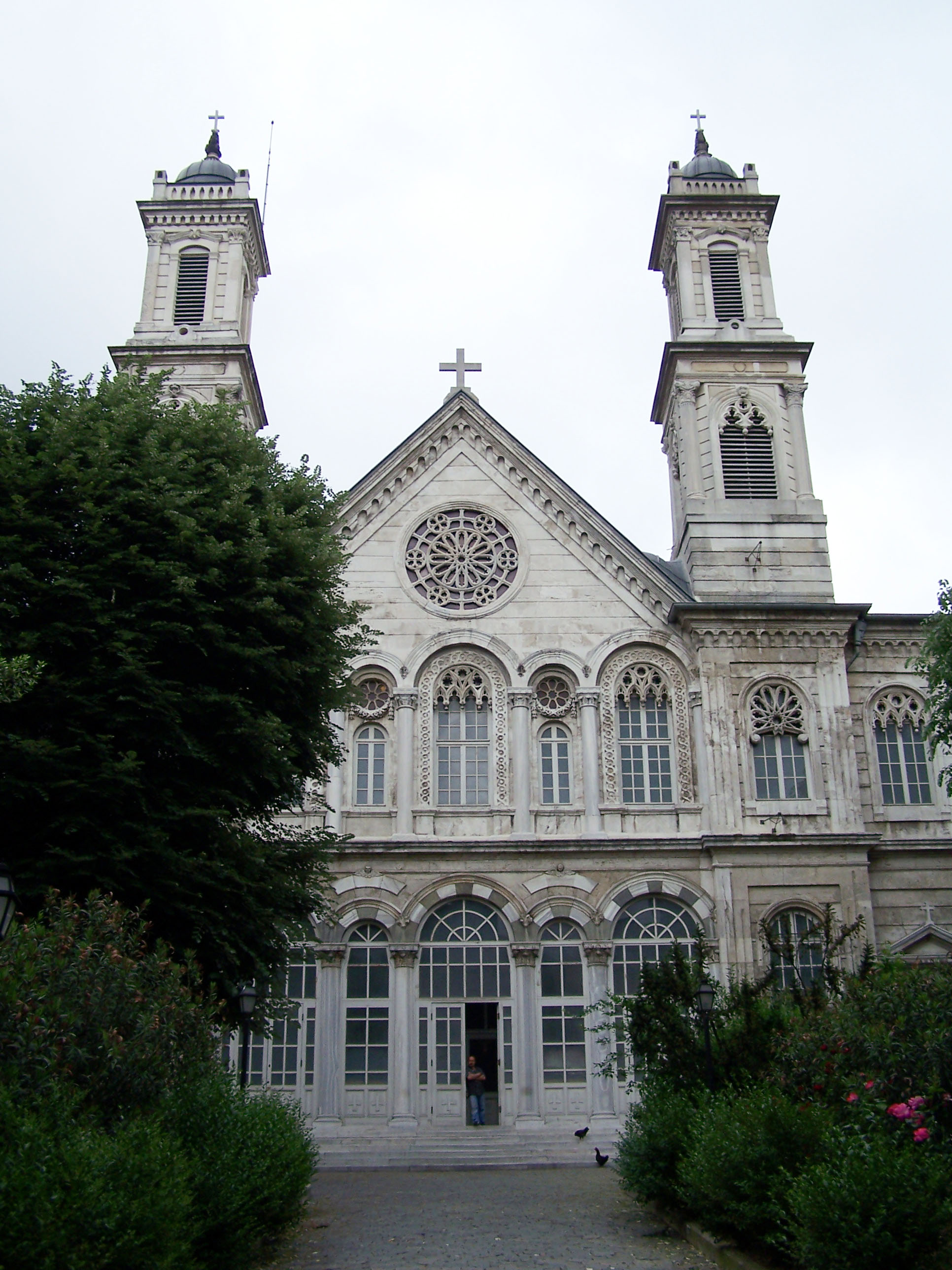 Aya Triada Rum Ortodoks Kilisesi in Beyoğlu, İstanbul, Turkey